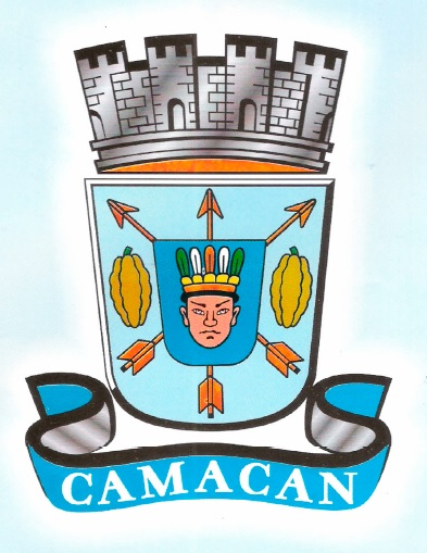 Brasão de Camacã, na Bahia.